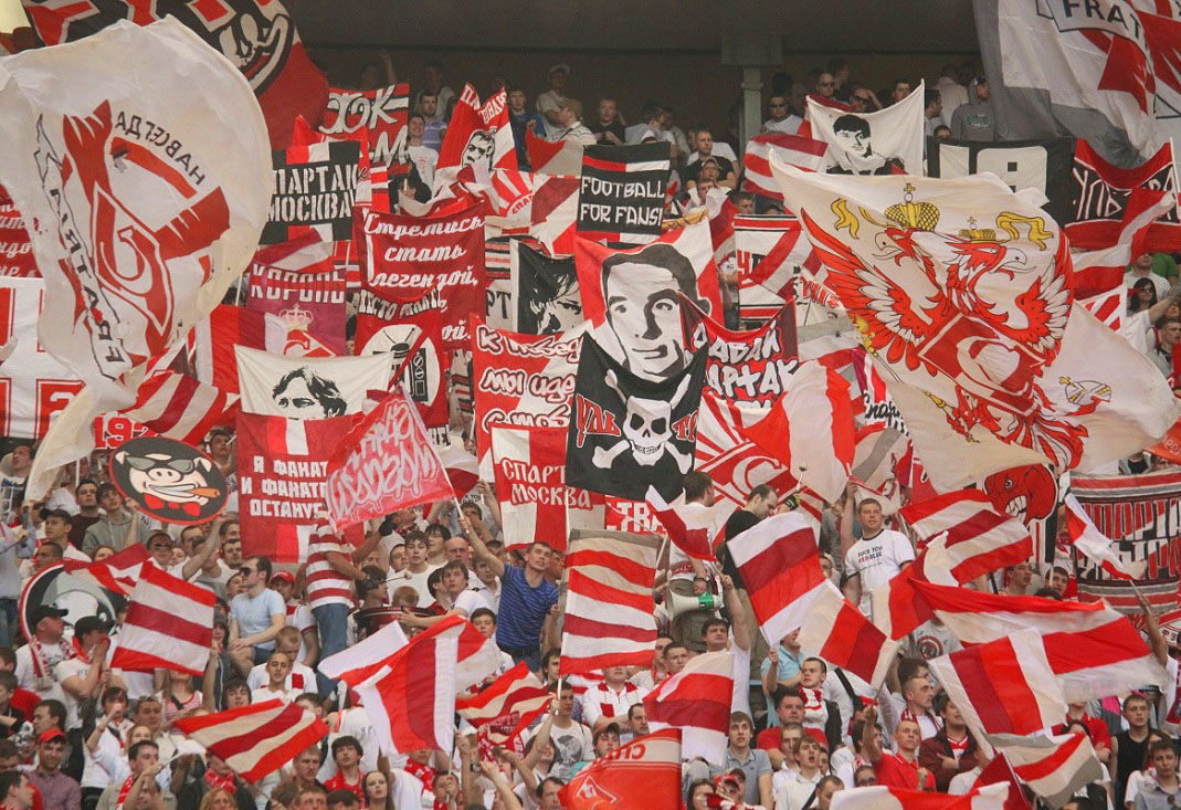 Визуалка Фратрии